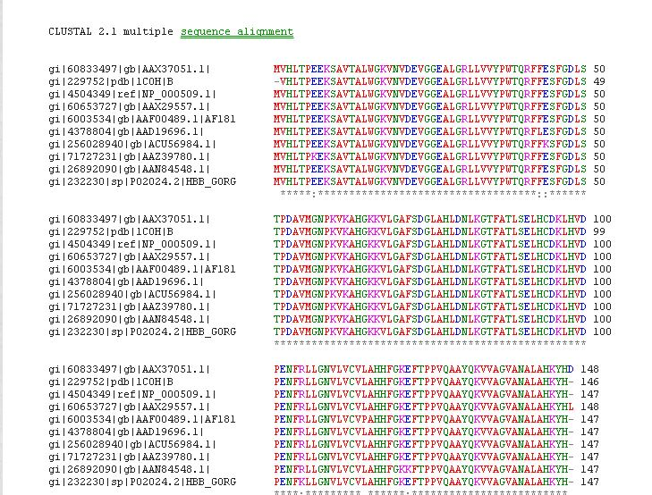 Pensejajaran sekuen jamak menggunakan ClustalW